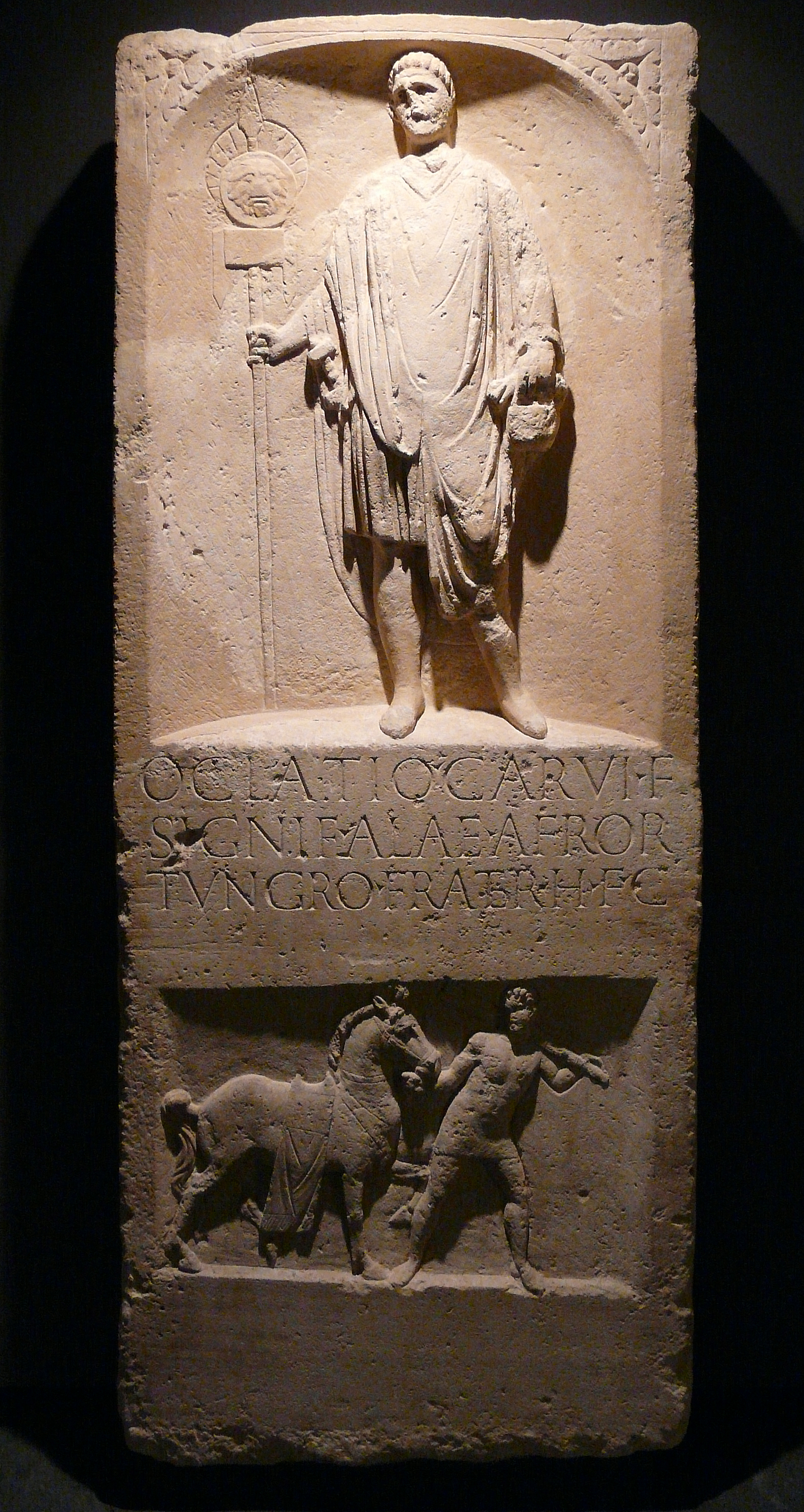 Grabstein des Oclatius (AE 1924, 00021, AE 1926, 00067) aus Novaesium (Gesamtansicht), Clemens-Sels-Museum, Neuss